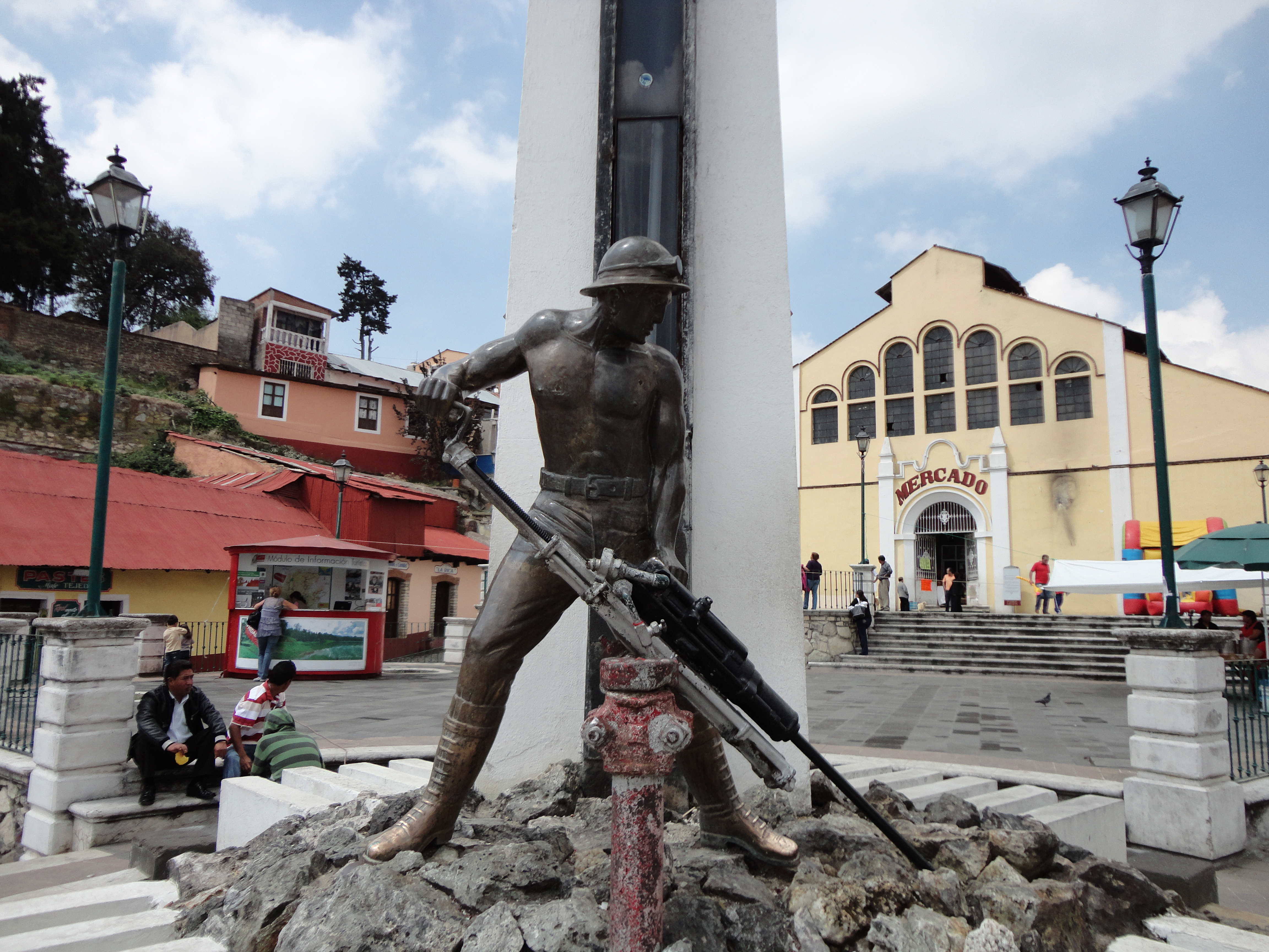 Honrando a los mineros que labraron la leyenda minera en mexico.